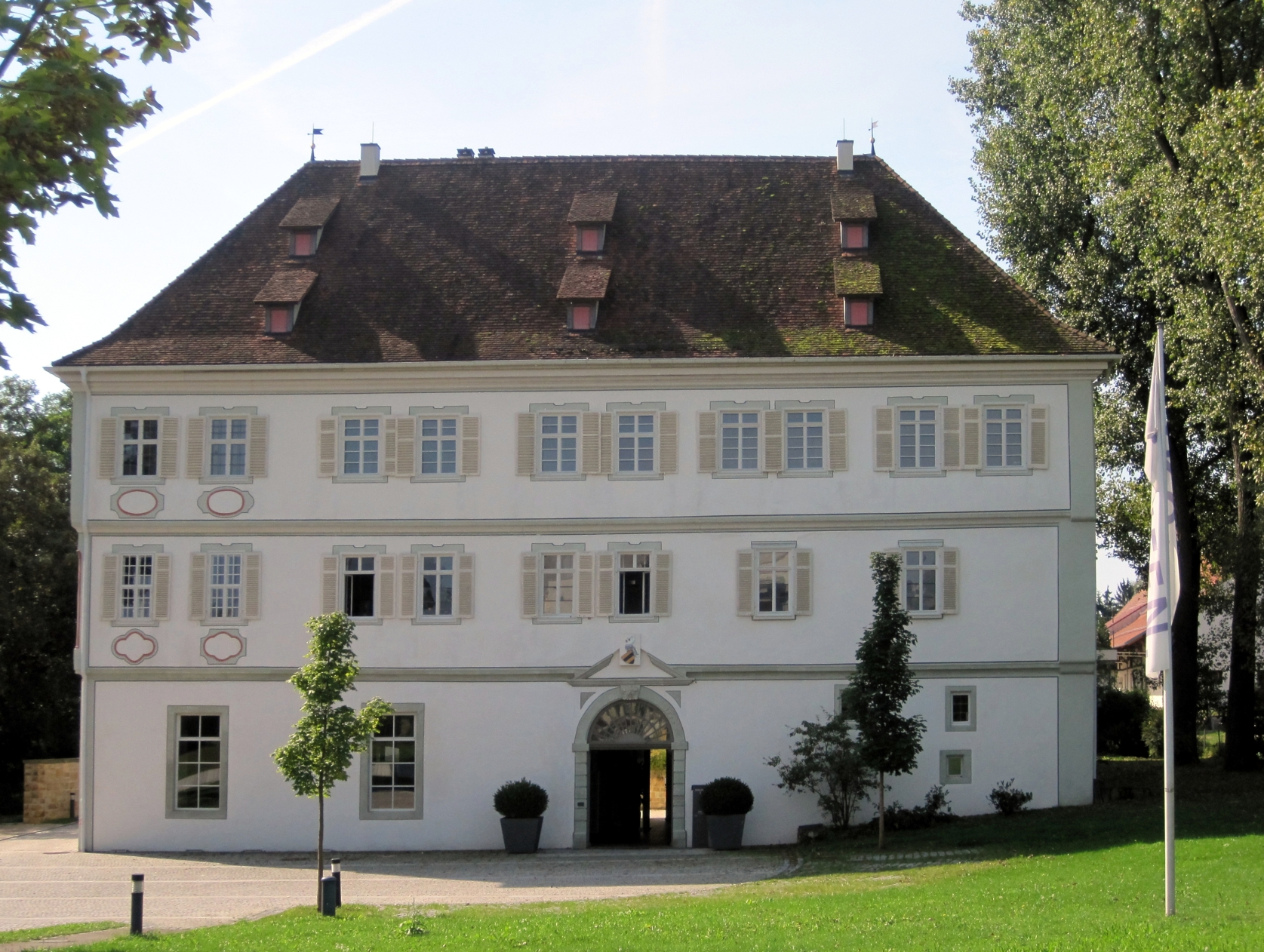 Das Schloss in Köngen. Es stammt aus dem späten 12. Jahrhundert und wurde 1620 von Heinrich Schickhardt umgebaut.